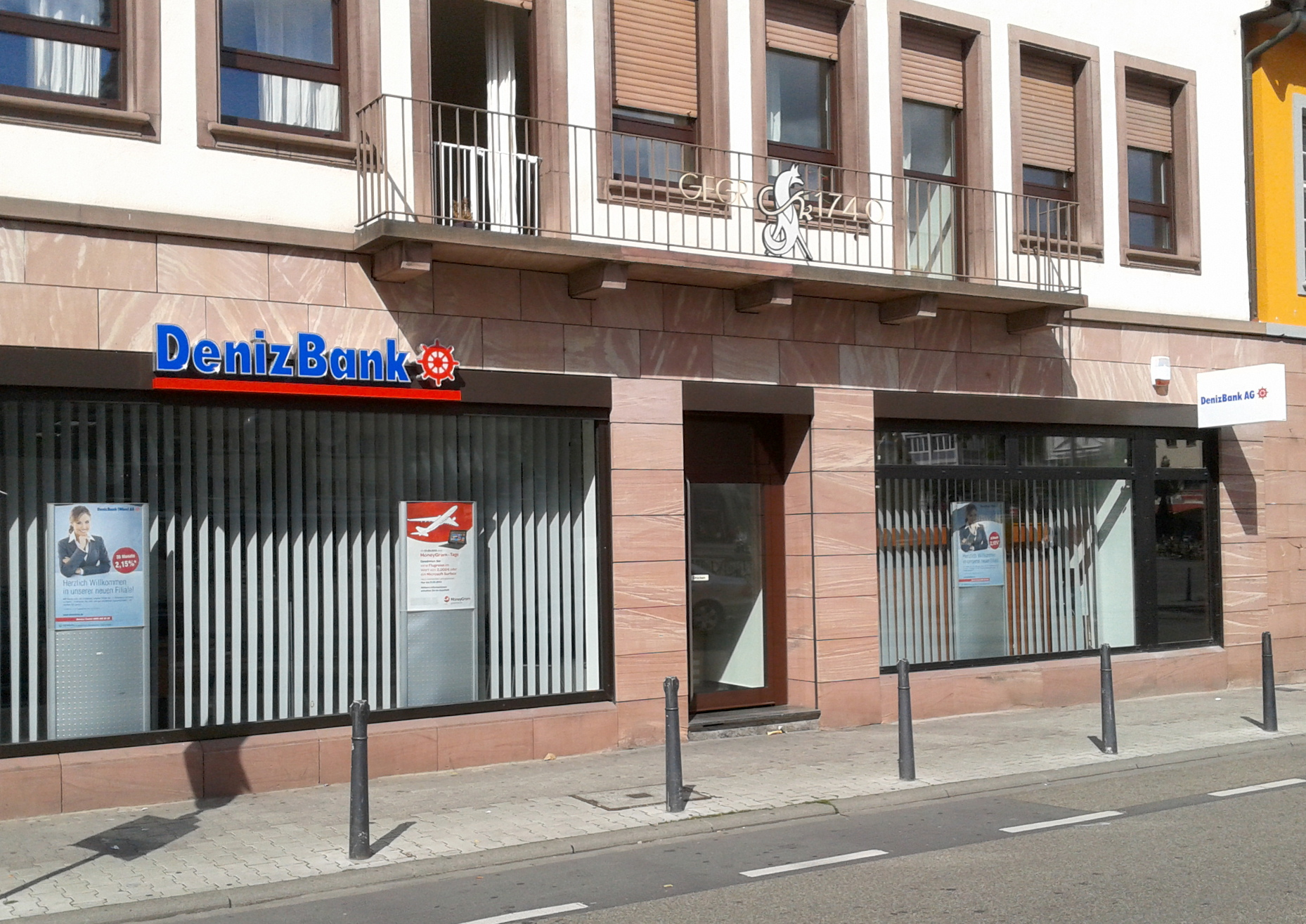 Denizbank in G2 am Mannheimer Marktplatz